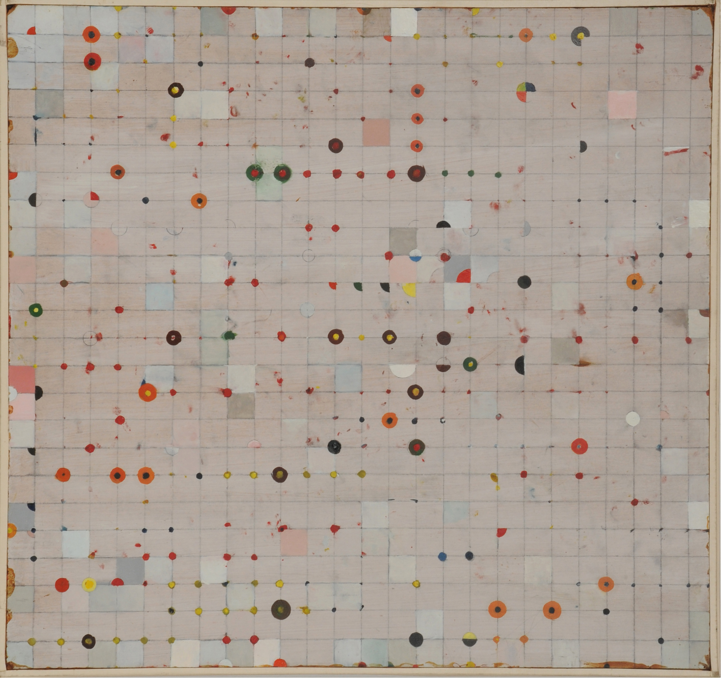 Ölbild von Peter Lakotta